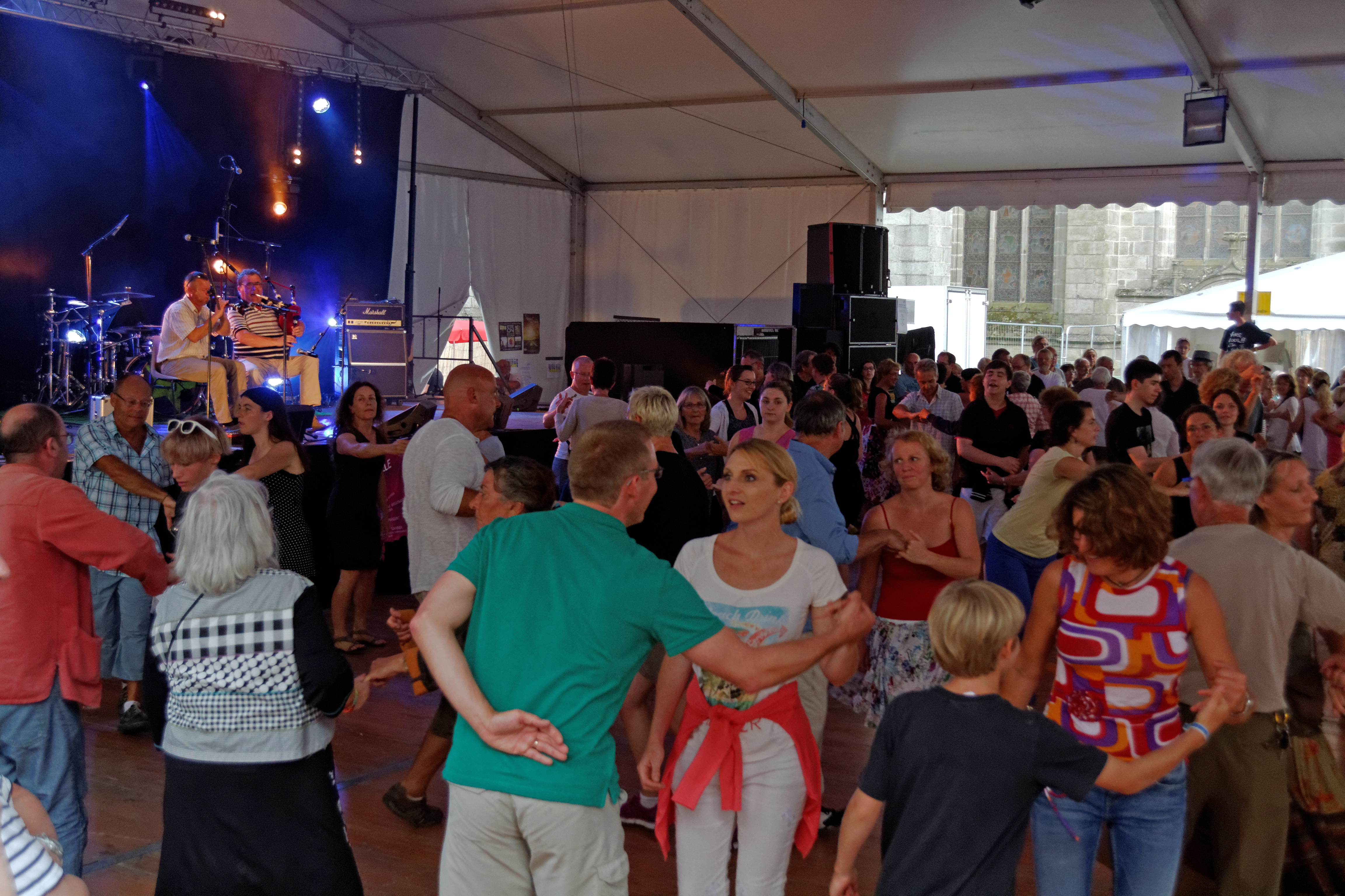 Le couple de sonneurs Fabrice Lothodé et Hubert Raud en fest-noz à l'espace Saint-Corentin lors du festival de Cornouaille le 24 juillet 2014.